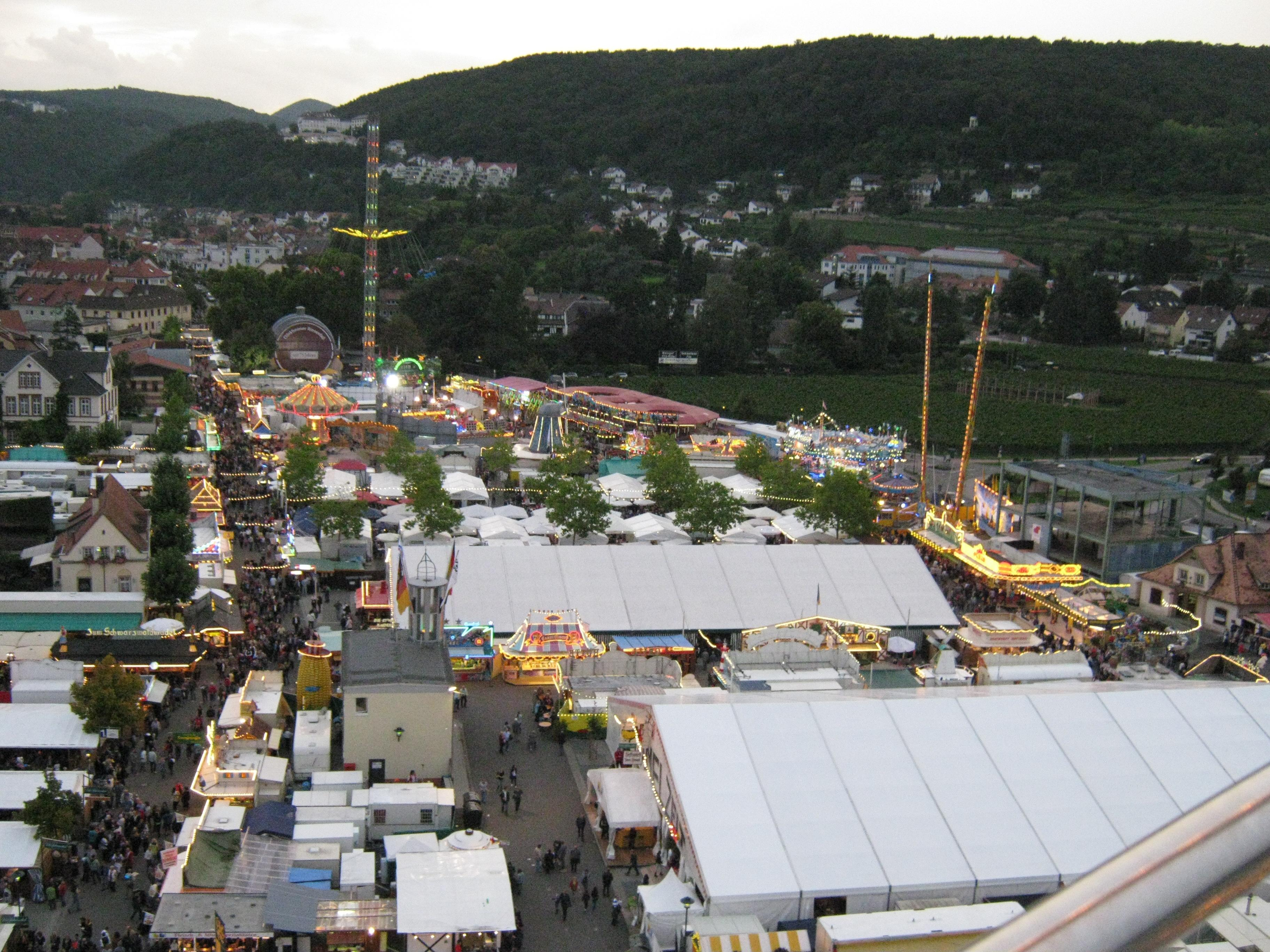 Wurstmarkt Bad Dürkheim, photographiert vom Riesenrad